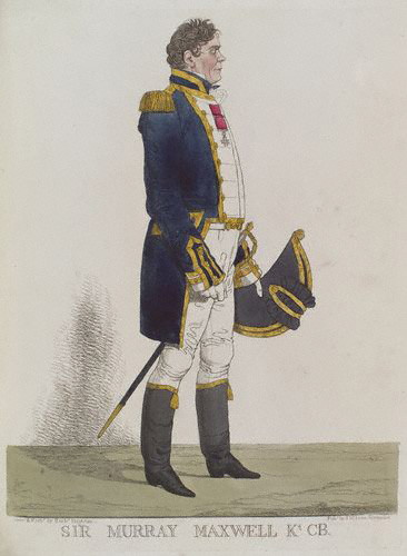 Sir Murray Maxwell